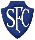 Logo: Serrano Foot Ball Club - Petrópolis (RJ), Brazil.